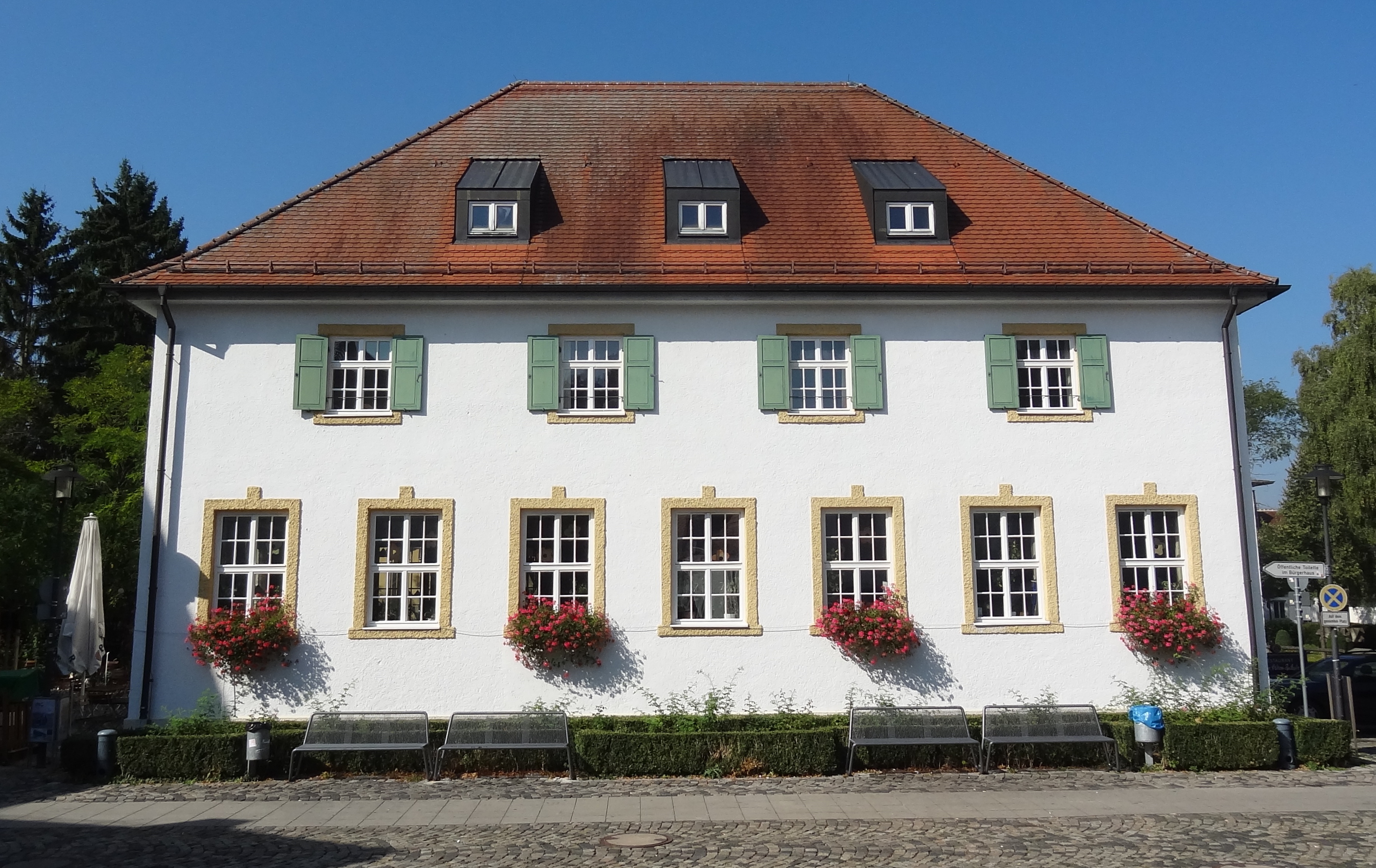 Rathausstraße 3 in Gröbenzell von OstenThis is a photograph of an architectural monument.